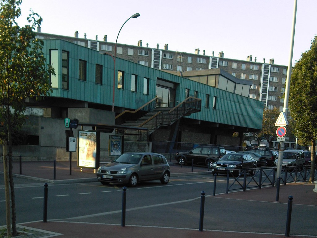 Drancy - Le conservatoire municipal